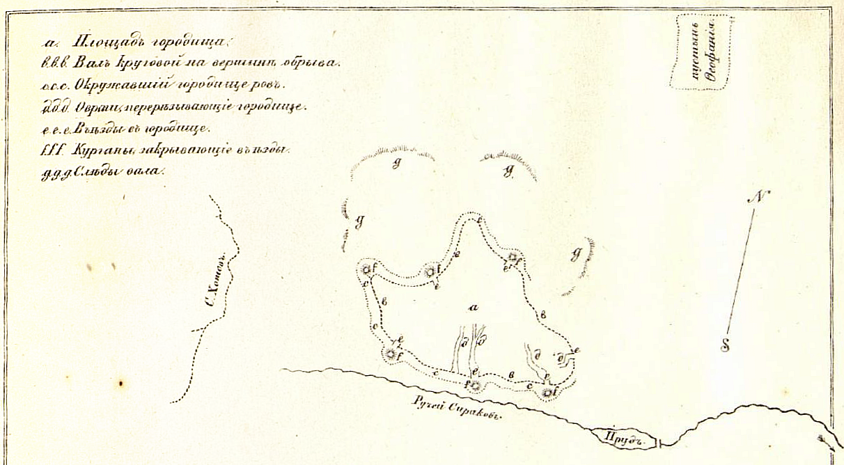 Хотівське городище скіфських часів. Малюнок В. Б. Антоновича, 1870-і роки